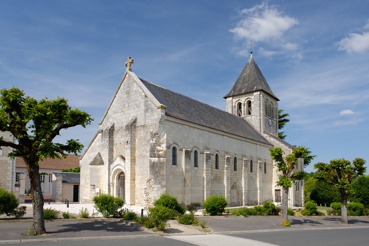 Église Saint-Martin de Bossay-sur-Claise .